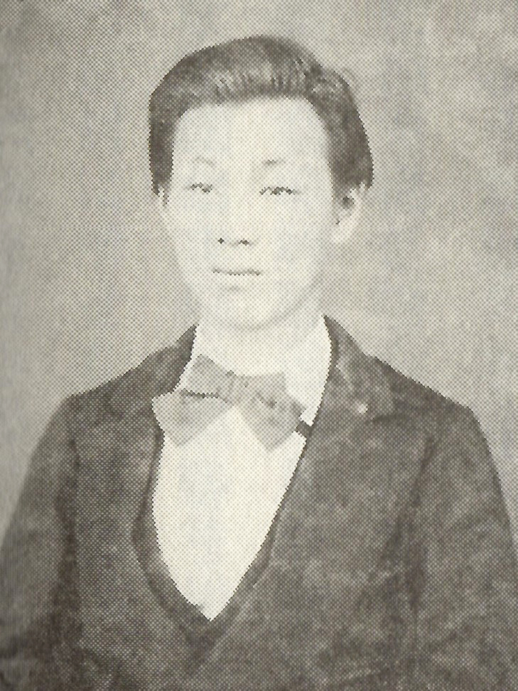 玉松真幸の肖像写真。